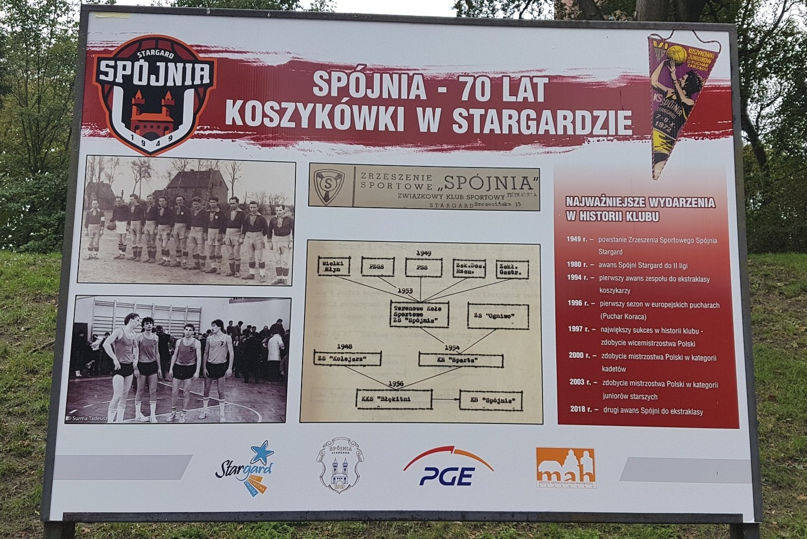 Wystawa - 70 lecie Spójnia Stargard